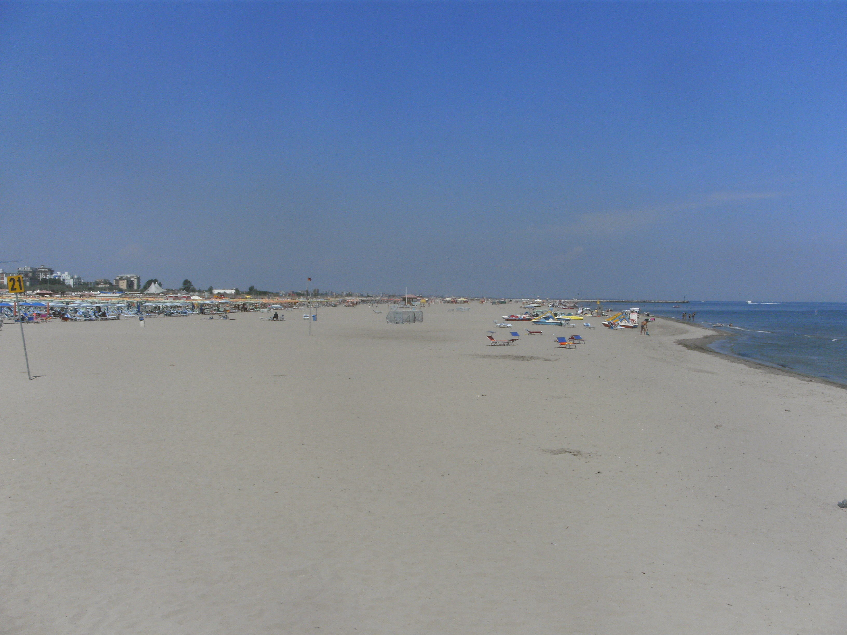 Lido degli Estensi (Comacchio, Provinz Ferrar). Das Foto zeigt den noerdlichen Badestrand von Estensi und im Hintergrund die Mole der Hafeneinfahrt von Porto Garibaldi.